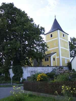 FJE selbst fotografiert